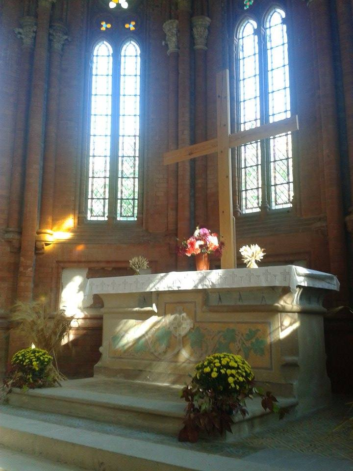 Anlässlich des 25. Landeserntedankfest Mecklenburg-Vorpommerns stand die restaurierte Semlower Kapelle für Besuche offen und war mit buntem Blumensträüßen reich geschmückt.